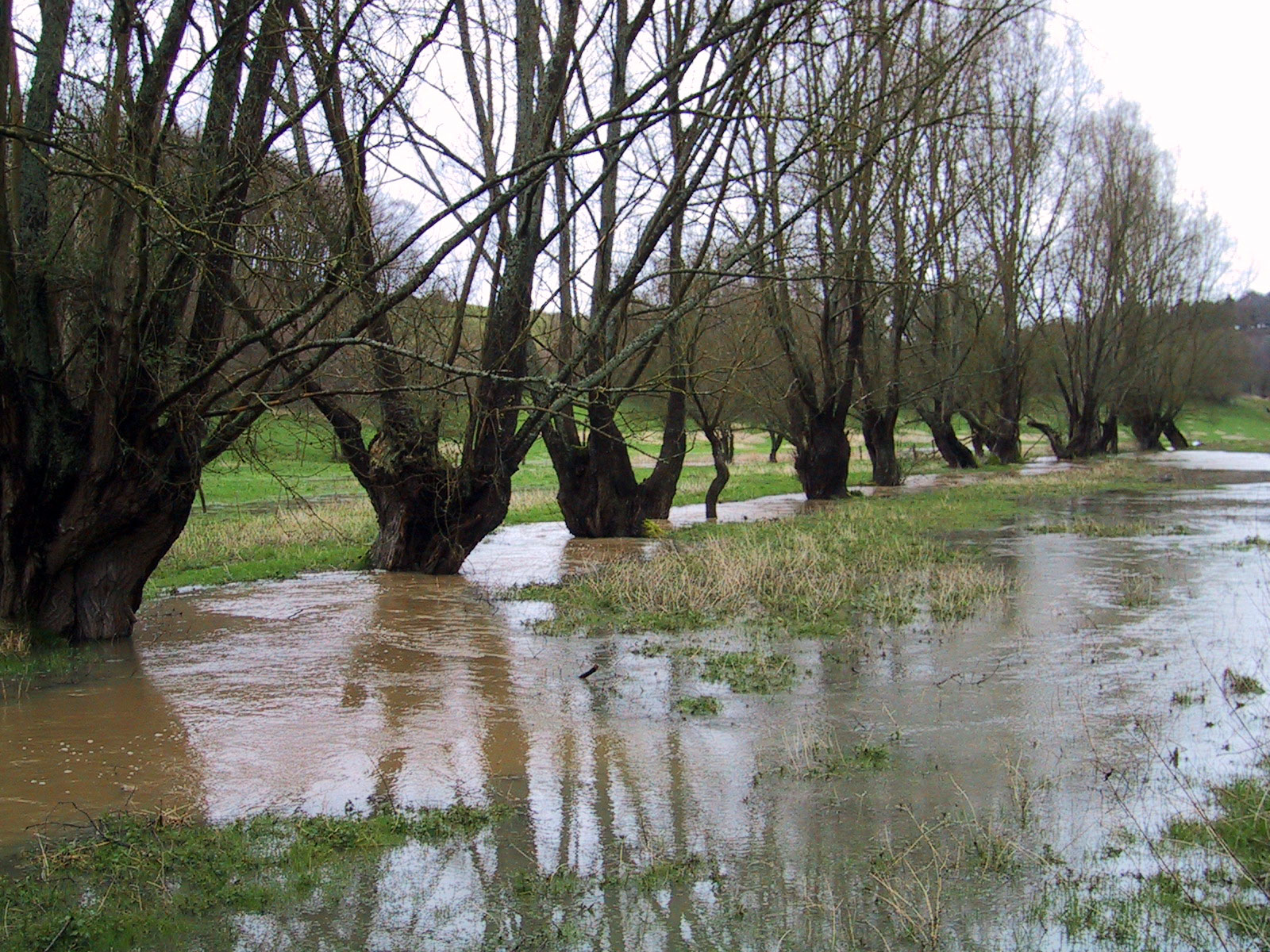 La rivière Oison en crue lors de pluies abondantes